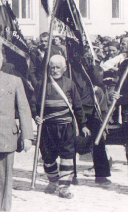 Рачо Узунов